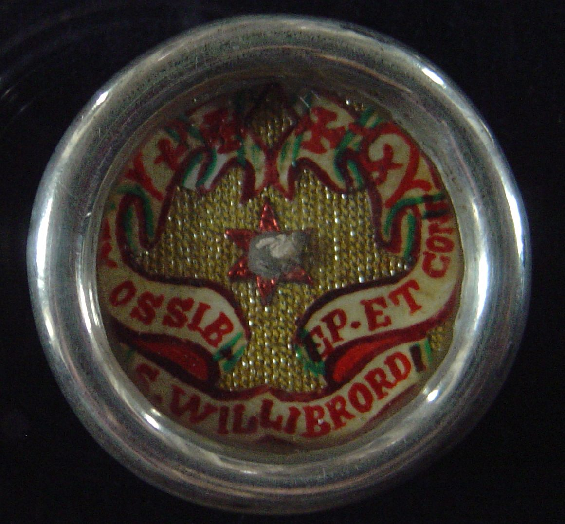 Een van de relieken die zich in het altaar van de Sint-Willibrorduskerk van Deurne-centrum bevinden. EX OSSIB. S.WILLIBRORDI EP. ET CONF. 15